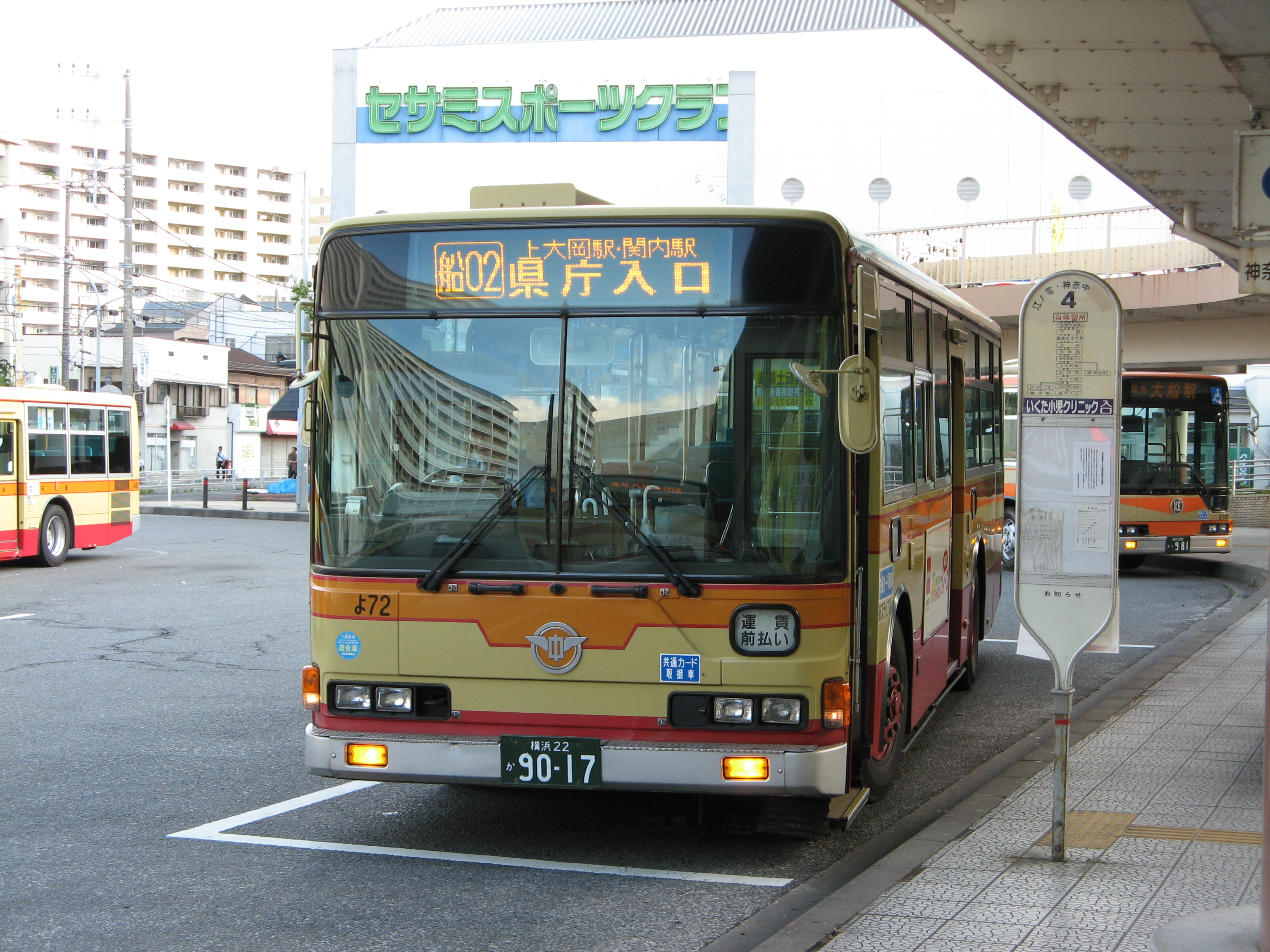 神奈川中央交通 船02県庁入口行き。